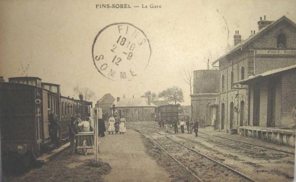 La gare de Fins-Sorel vers 1910.